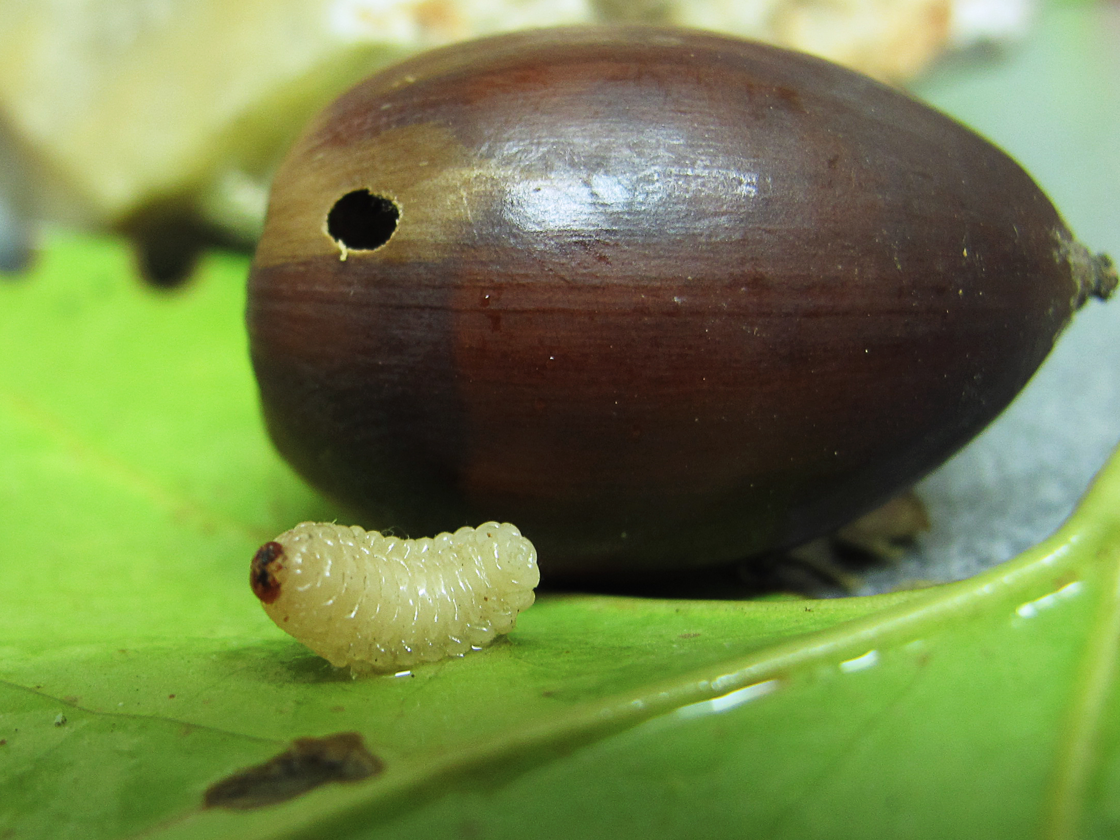 Curculio elephas Traje el otro dia del bosque 5 bellotas del suelo, las deje en la cocina en un cenicero tranquilas y tenian sorpresa !!!! Existen varias especies de insectos cuyas larvas se alimentan del interior de las bellotas. El más abundante de ellos es este “gorgojo" un pequeño coleóptero de color castaño rojizo con manchas oscuras, con una probóscide o trompa, la cual es incluso más larga que el cuerpo. Aparecen en primavera, a finales de la cual se realiza el apareamiento y la puesta, que suele constar de unos 20 huevos o algo más. La hembra escoge la bellota y con ayuda de su larga trompa realiza un profundo pero diminuto agujero en la bellota, tras lo cual se da la vuelta y deposita el huevo. Al nacer las larvas comienzan a alimentarse del interior de la bellota, El desarrollo de la larva desde la puesta dura algo más de un mes. Cuando la bellota cae al suelo, (los frutos parasitados suelen caer prematuramente) la larva realiza un grueso agujero de salida (del tamaño de su cuerpo) y abandona la bellota, enterrándose en el suelo generalmente a menos de 10 cm de profundidad. Allí pasa el invierno, realizando posteriormente la metamorfosis en fase de crisálida, apareciendo la nueva generación de insectos adultos en primavera.